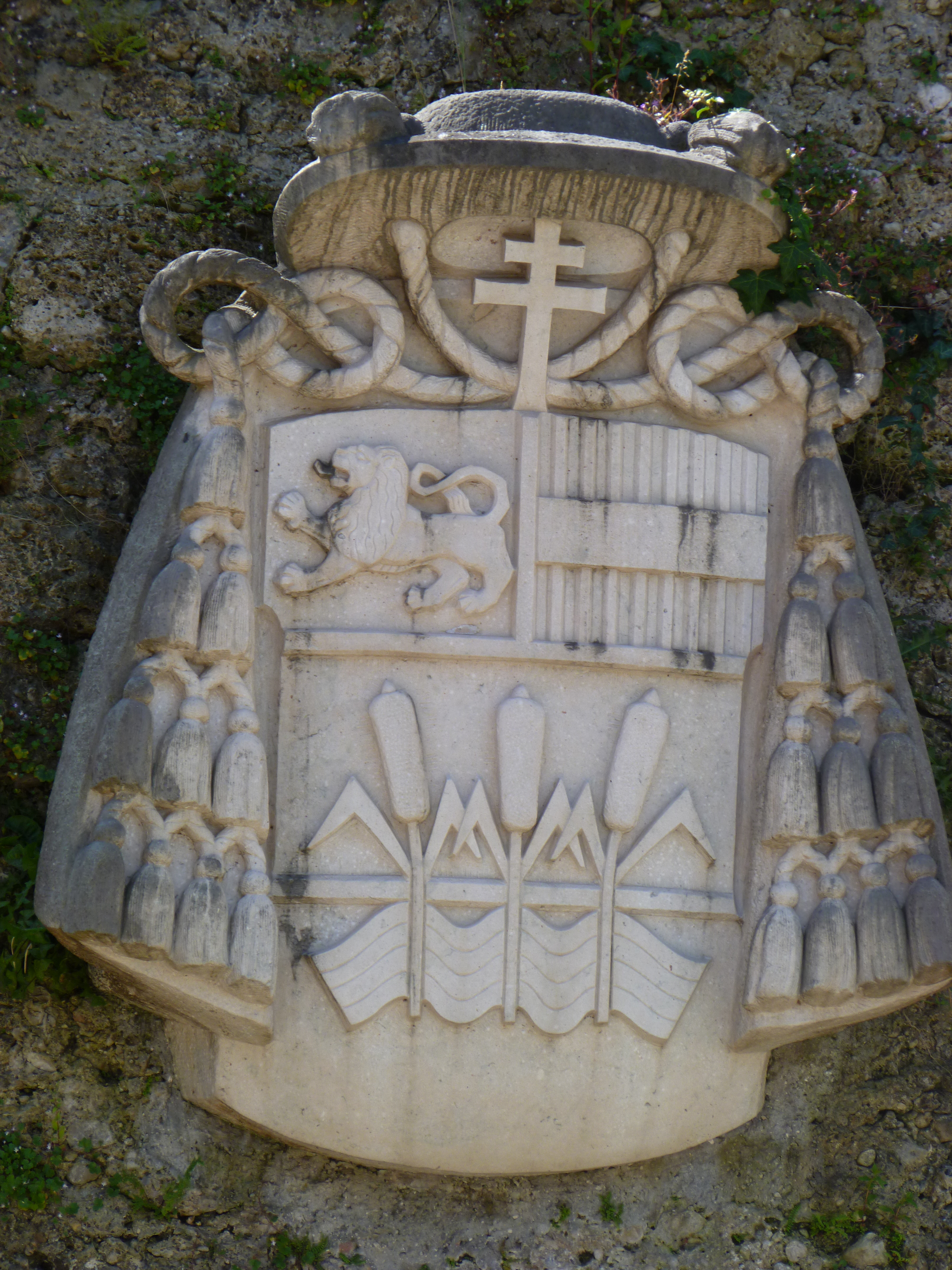 Wappen von Andreas Rohracher im Hof der Edmundsburg